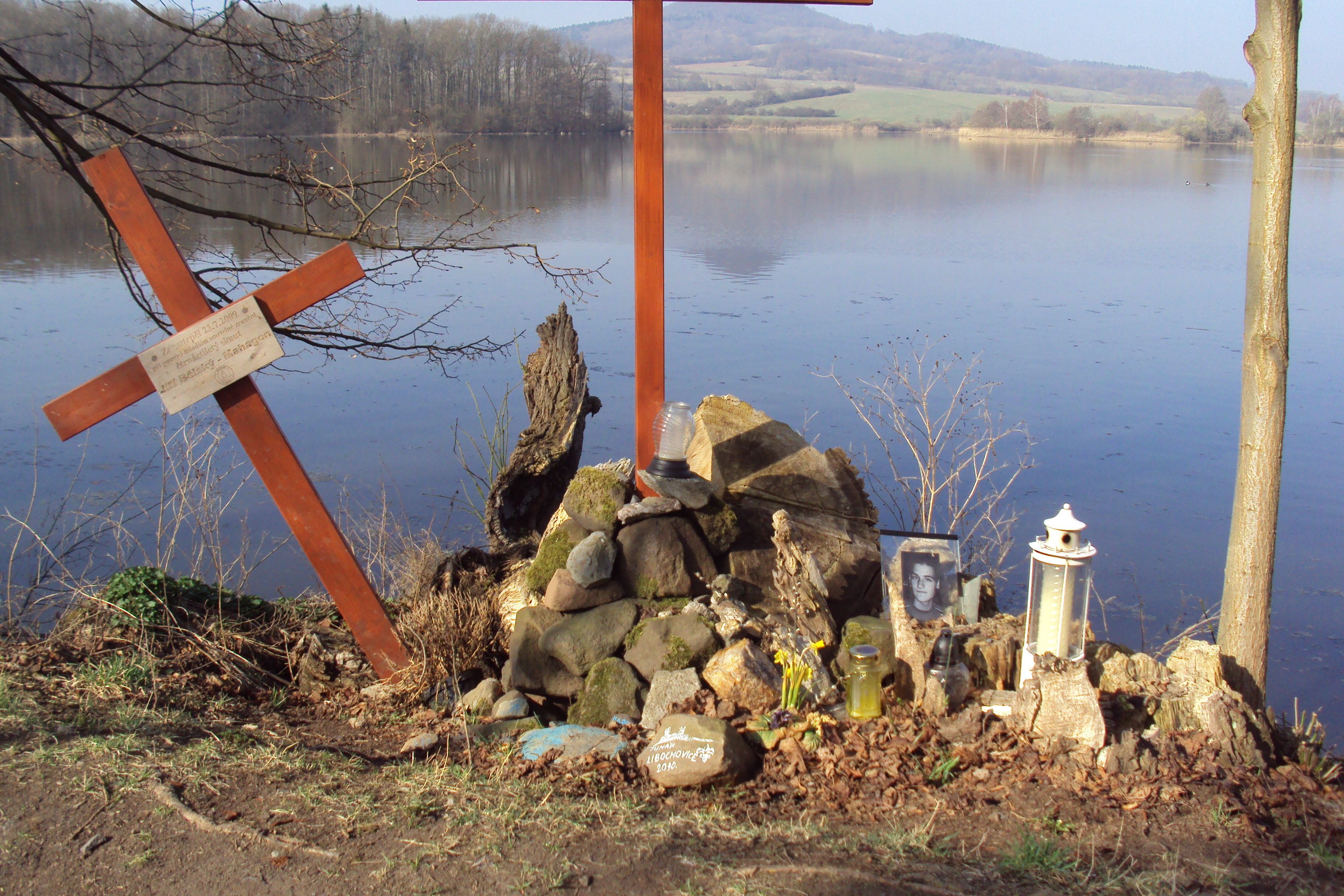 Pomníček utonulého chlapce 2009 na břehu Dolanského rybníka u Stvolínek na Českolipsku